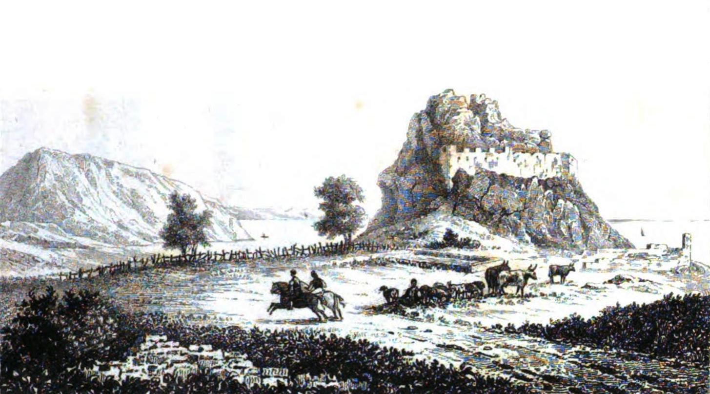 Die Krim. Gursuf.